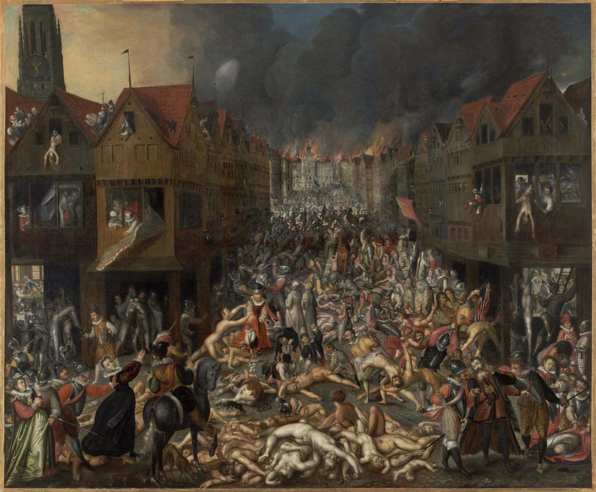 De Spaanse Furie, anoniem, ca 1585, MAS